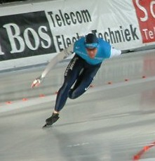 Gianni Romme in het NK Allround 2004 in het IJssportcentrum in Eindhoven (december 2003)